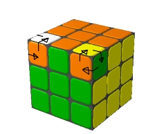 cubo de rubik Dibujo realizado por Josemanuel